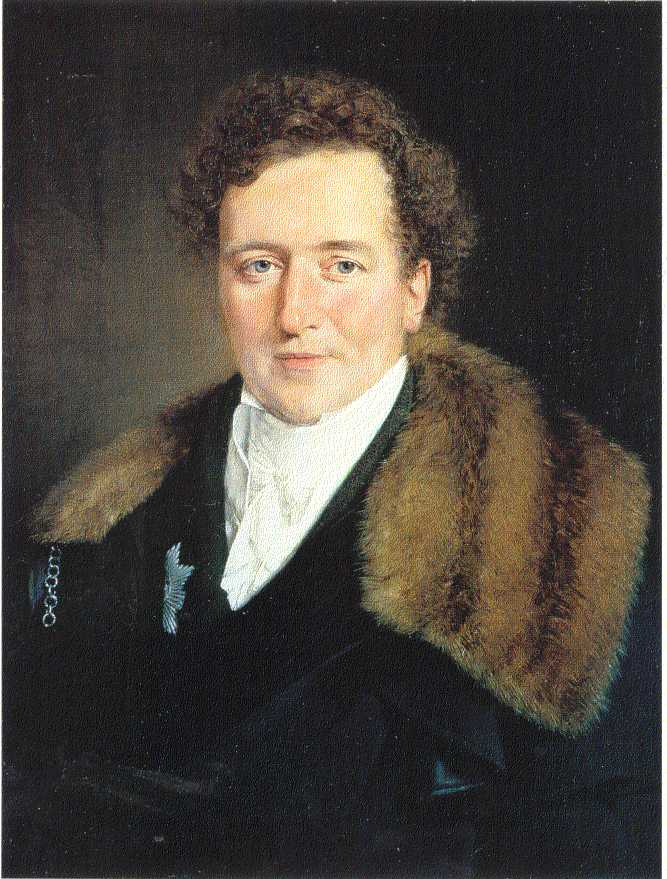 Christian VIII. (1786-1848)